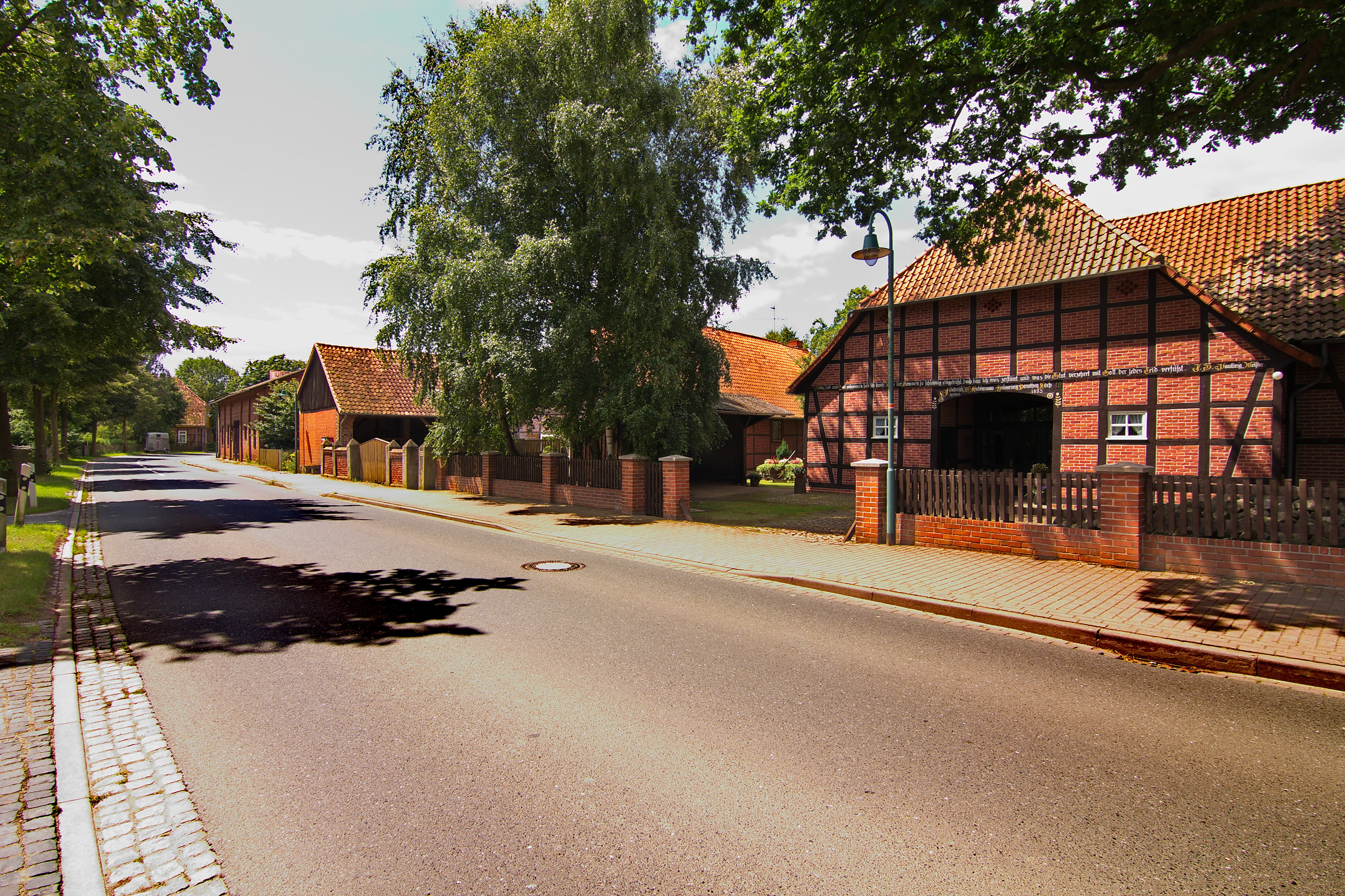 Ortsblick Gilten, Niedersachsen, Deutschland.